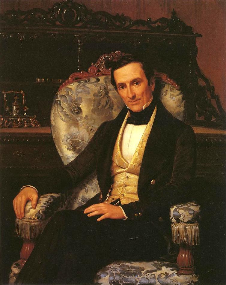 Retrato de José Bernardo Couto, hecho por Pelegrín Clavé en 1849.